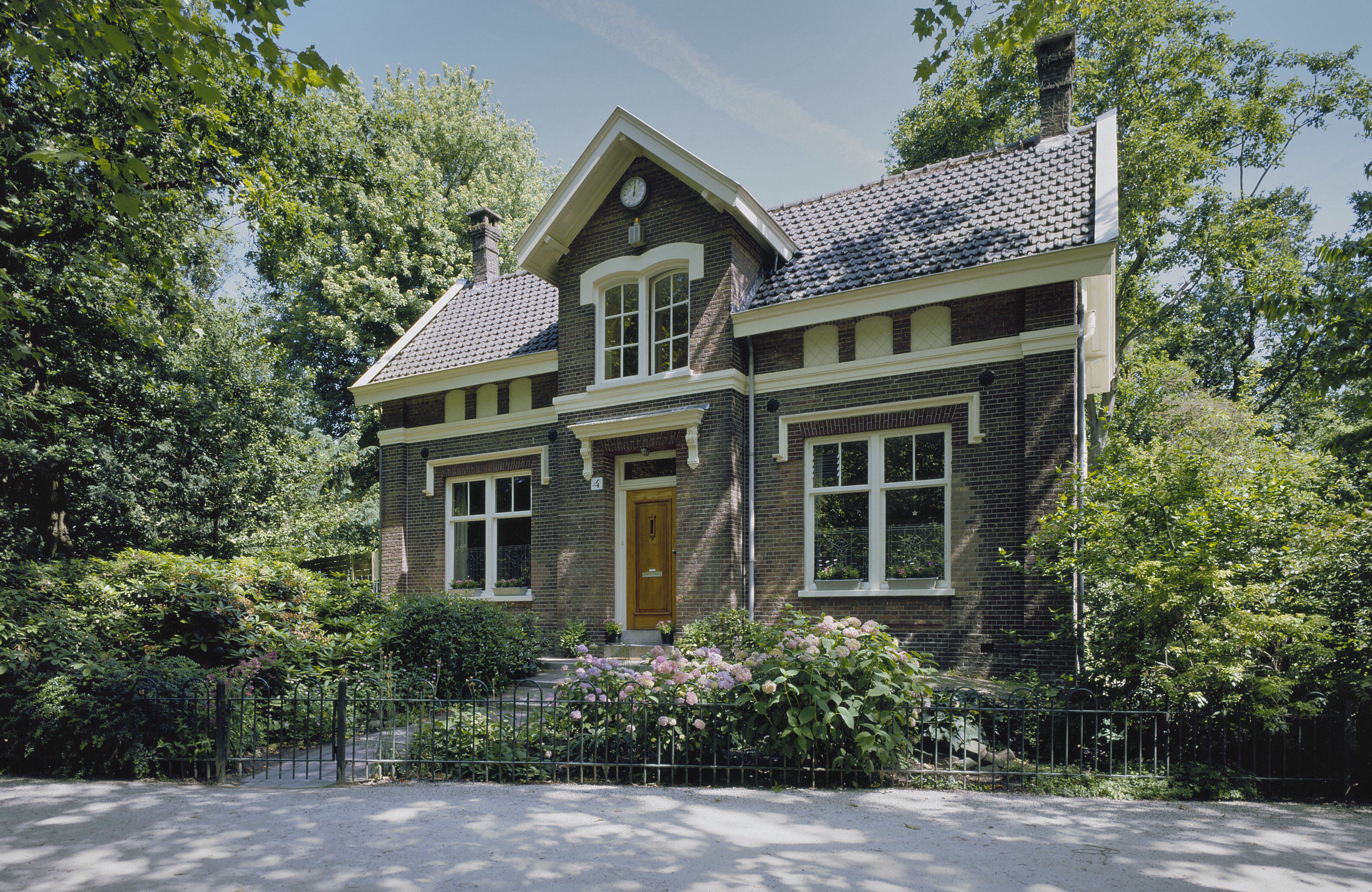 Vondelpark: Overzicht van de voorgevel (opmerking: Gefotografeerd voor "ANWB Monumentenboek Nederland")